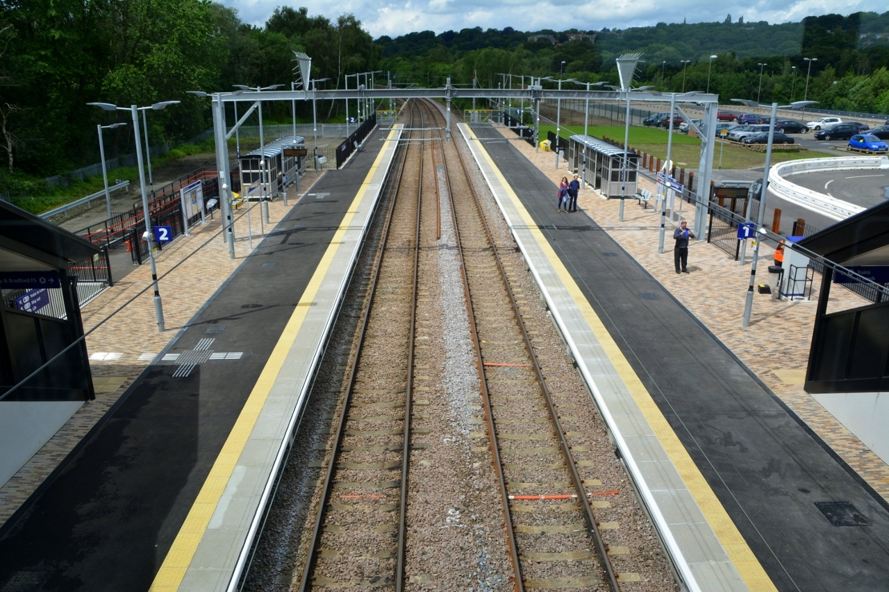 Kirkstall Forge. Leeds